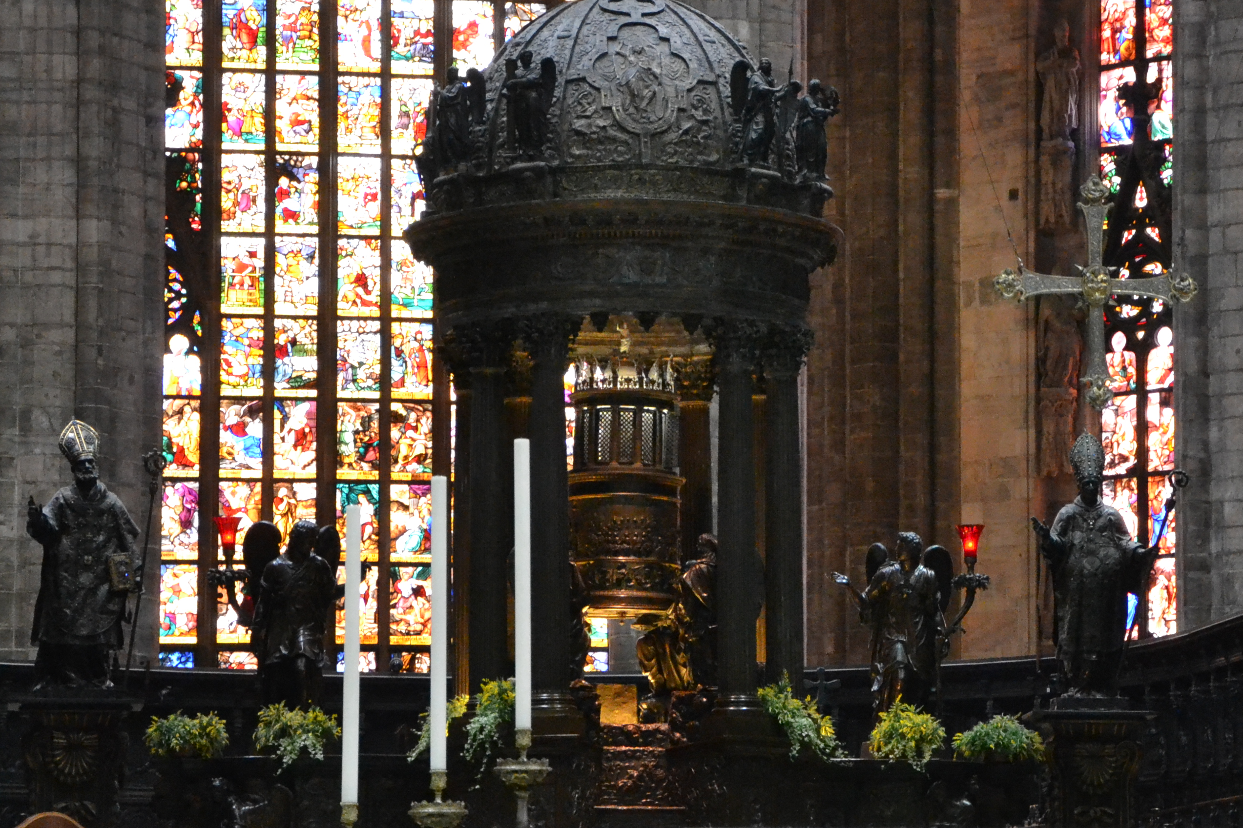 Milano, Duomo, Presbiterio di Pellegrino Tibaldi, XVI secolo. Il Tempietto o ciborio del Pellegrini, che racchiude al suo interno il tabernacolo cilindrico a torre, dono del 1591 di Papa Pio IV Medici al nipote Carlo Borromeo. Il tempietto ha la forma di un piccolo tempio classico circolare, la cui cupola è adornata da statue di angeli e coronata dal Salvatore. Esso ripete nella forma il tabernacolo interno, cilindrico, retto da quattro angeli e interamente modellato con episodi della vita di Cristo. Ai due lati del ciborio sono le due imponenti statue in argento di san Carlo e sant'Ambrogio, capolavoro di scultura ed oreficeria barocca. La statua di san Carlo, risalente al 1610, fu modellata dallo scultore Andrea Biffi e cesellata dall'orafo Verova. La Mitra è ornata con perle e pietre preziose donate dai fedeli. La statua di sant'ambrogio, Successiva di quasi un secolo (1698), l'intera superfice è fittamente cesellata e decorata con diamanti e pietre dure.